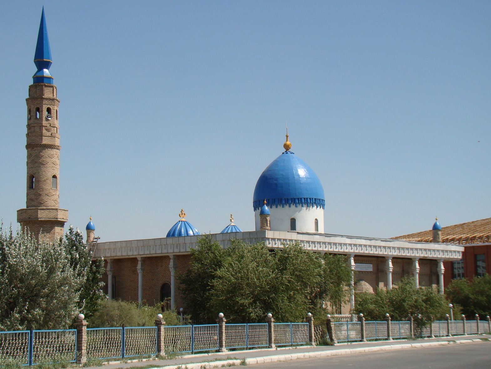 Қызылорда қаласында орналасқан Айтбай мешіті